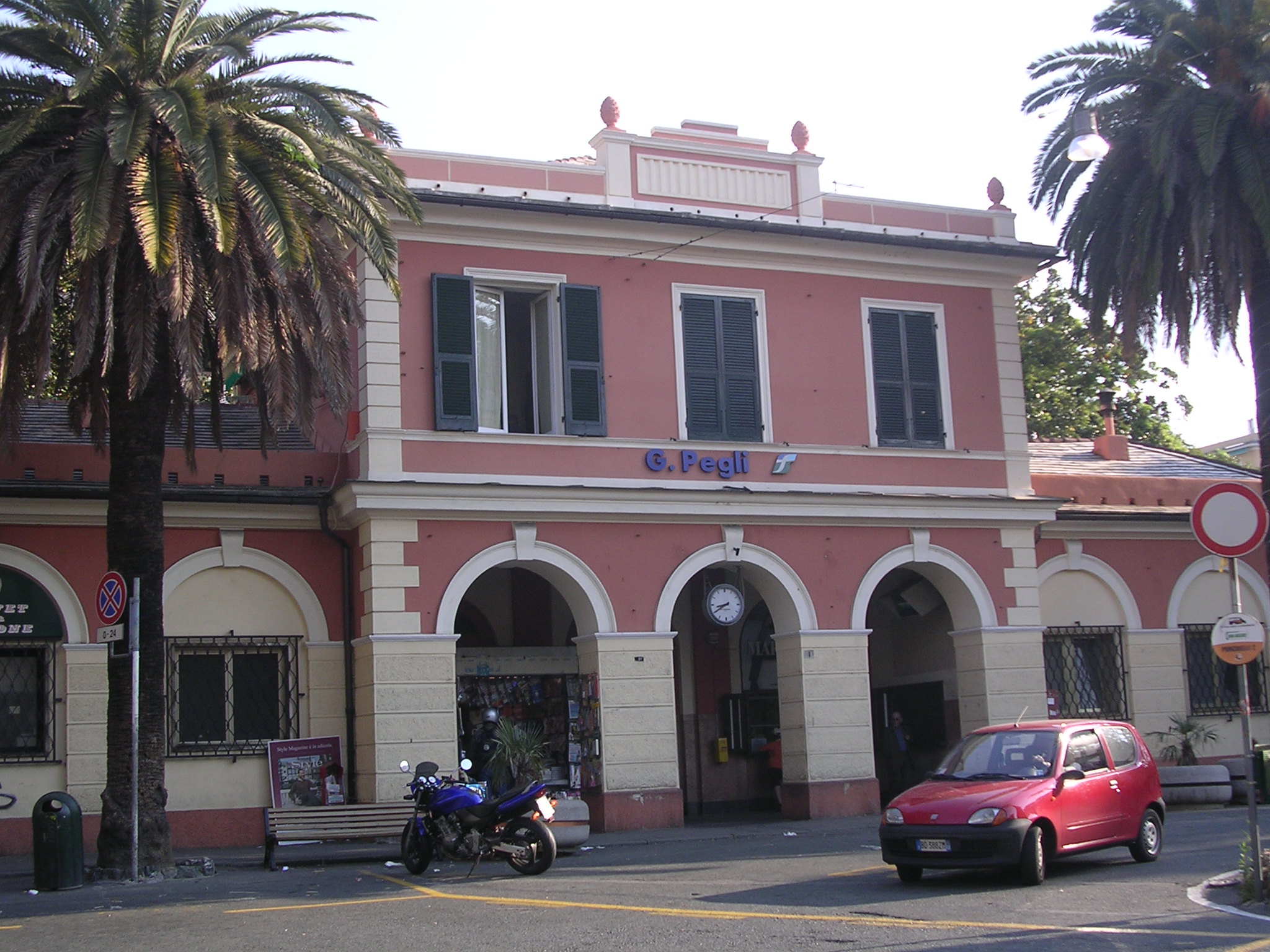 Fabbricato viaggiatori della stazione di Genova Pegli